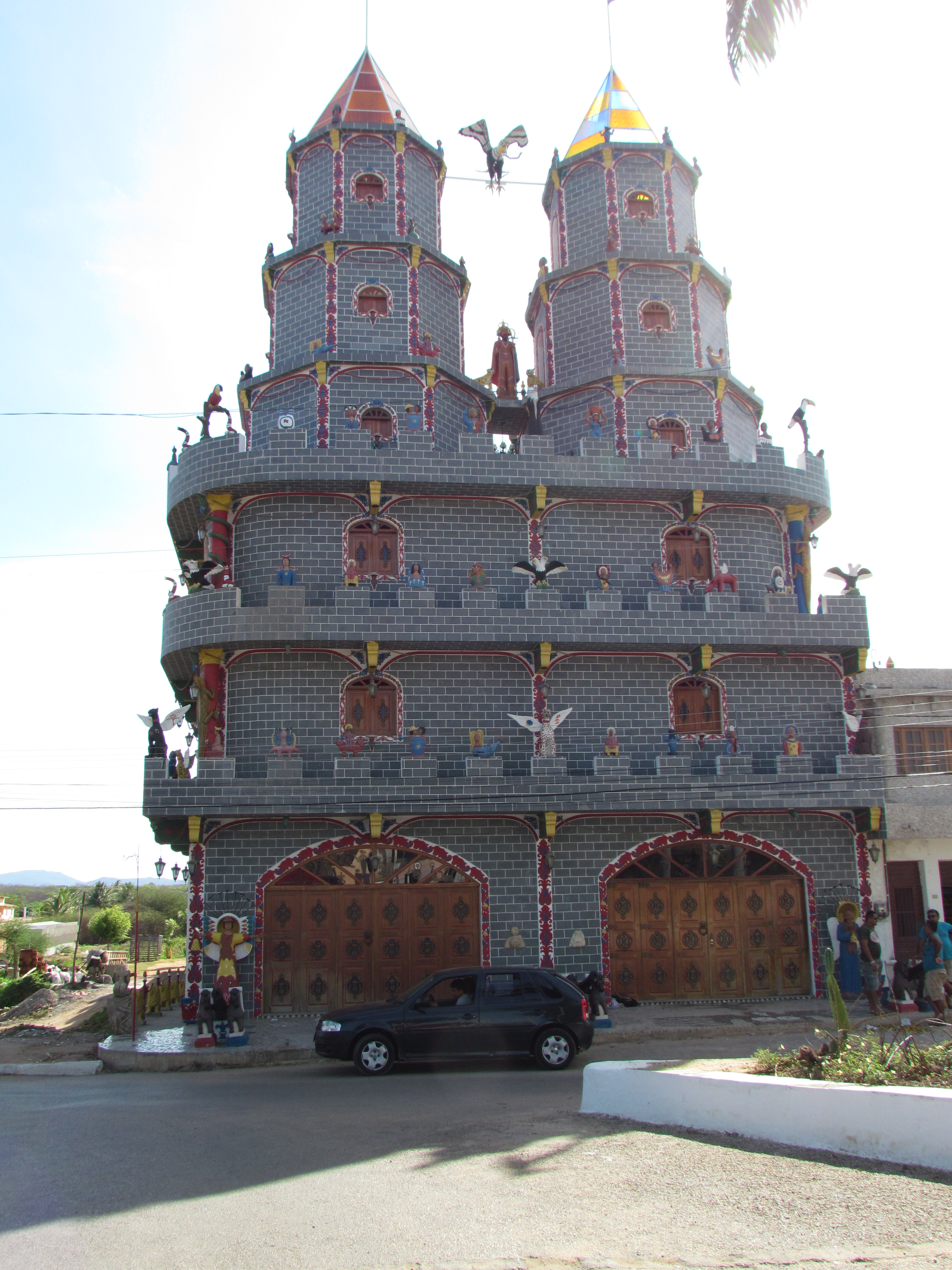 Castelo do Reino Encatado